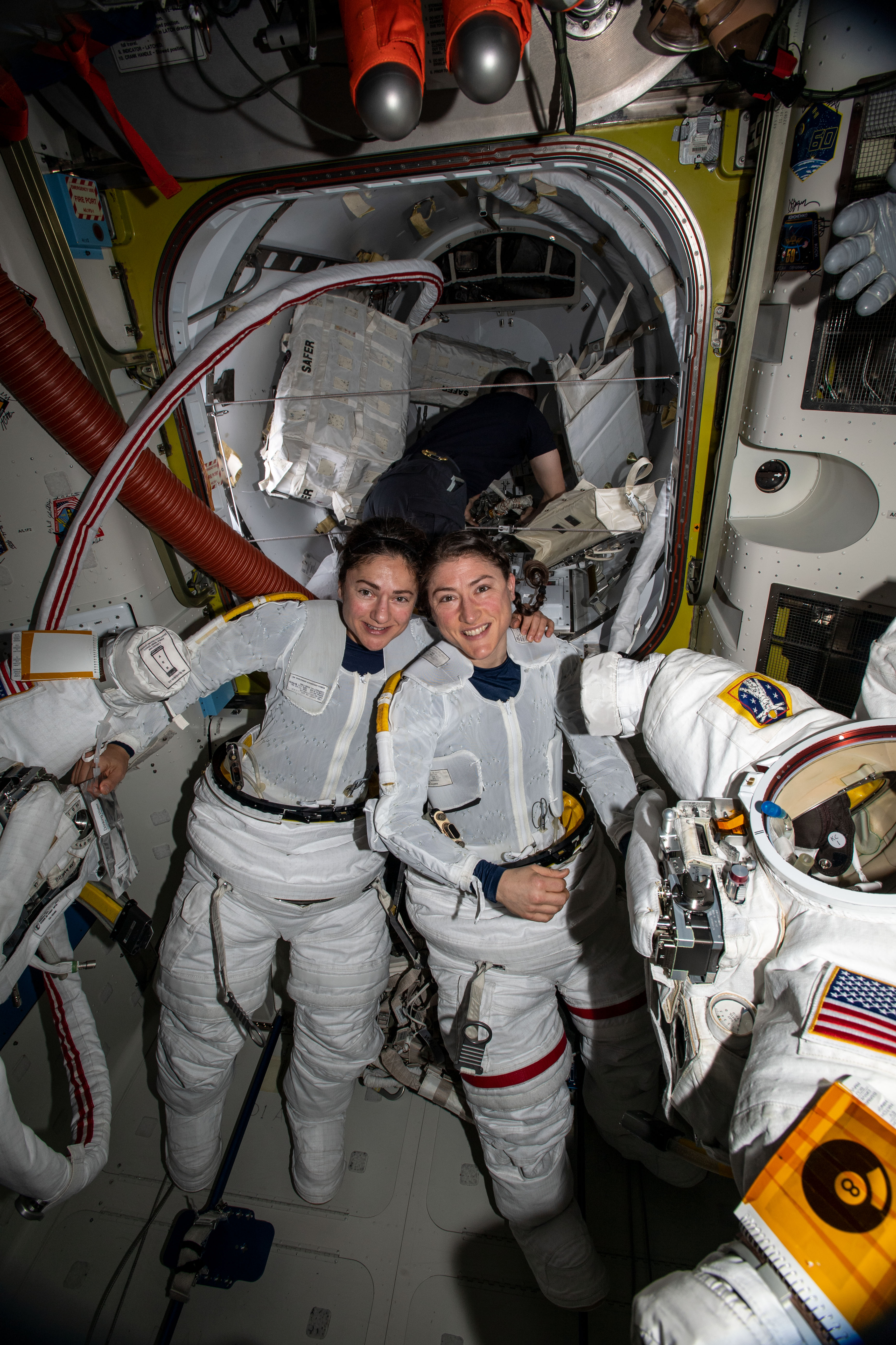 Astronauterna Jessica Meir och Christina Koch tar på sig sina rymddräkter inför den första helt kvinnliga rymdpromenaden från rymdstationen